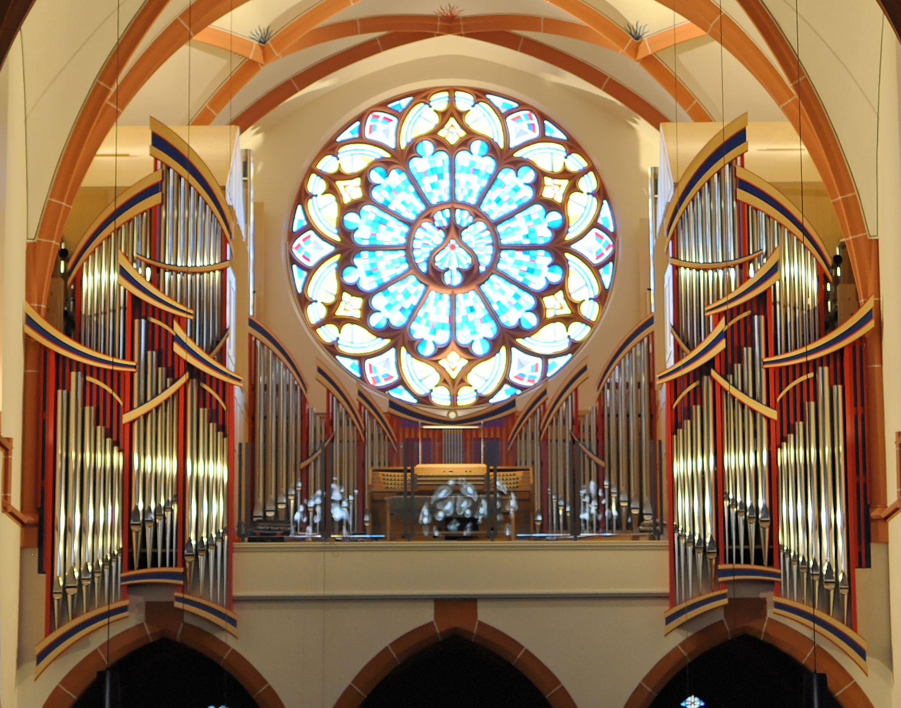 Neue Hauptorgel von St. Bonifatius Gießen - Erbauer: Eule-Orgelbau Bautzen